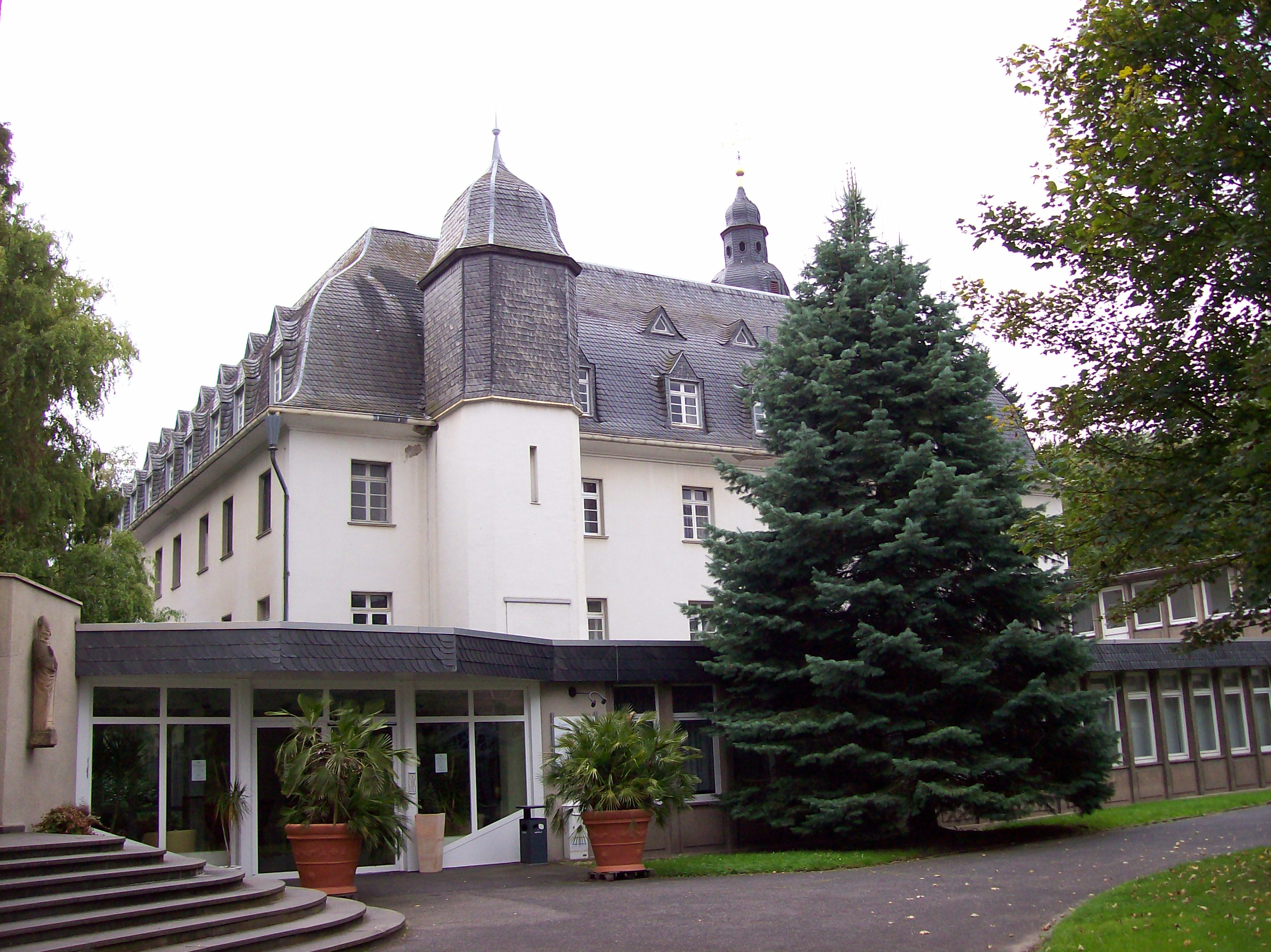 Rheindorfer Burg und Kloster in Bornheim-Walberberg (Germany)